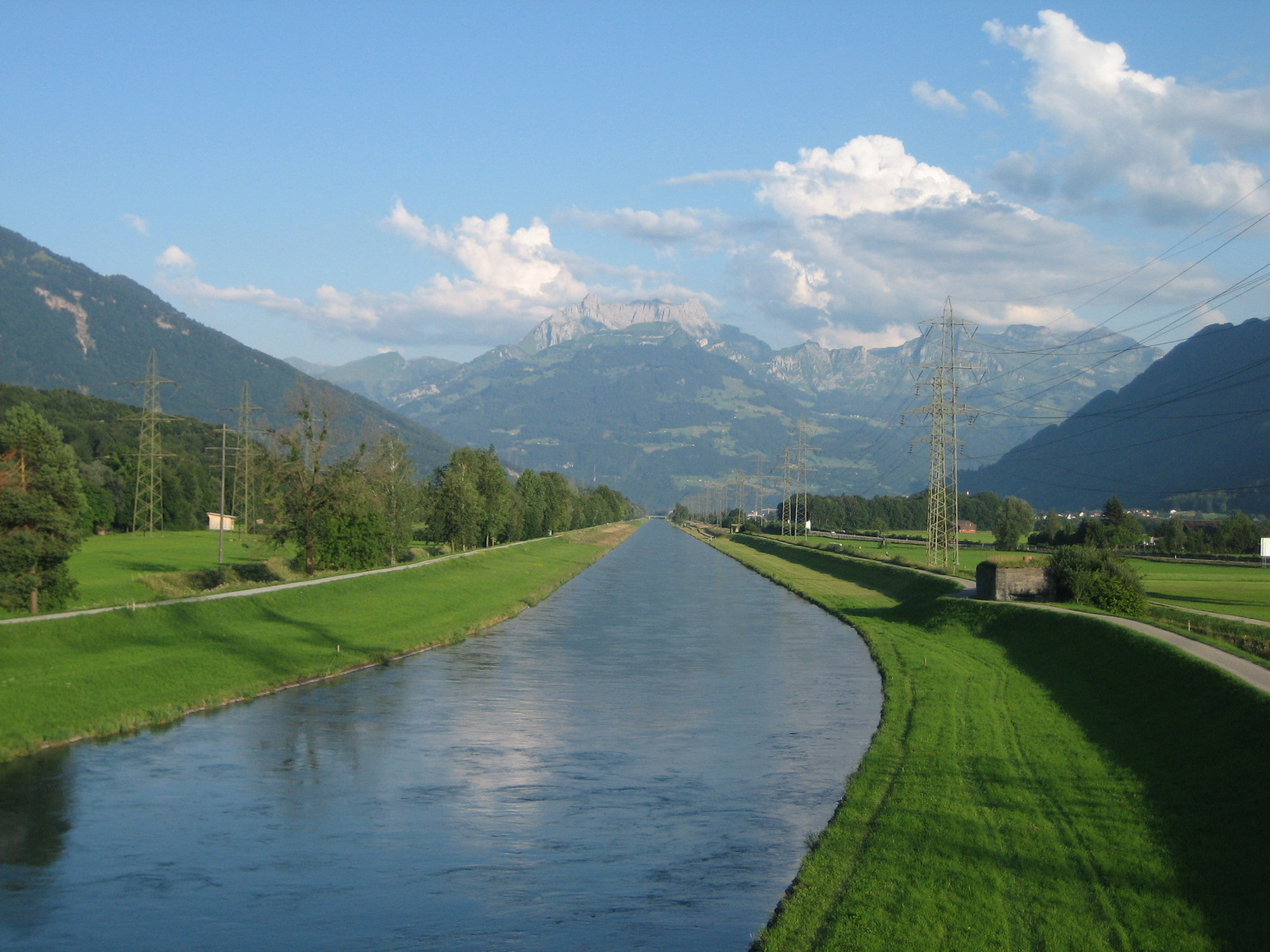 Die Linth in Benken (nahe Reichenburg) Richtung Süden